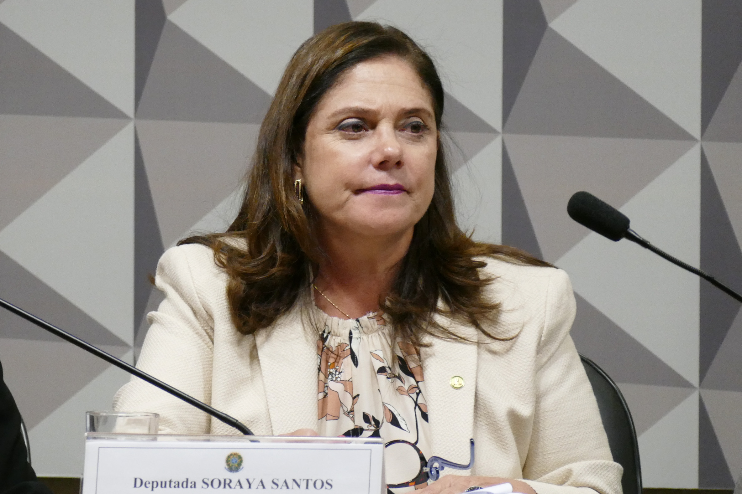 Comissão Mista da Medida Provisória (CMMPV) nº 700 de 2015 que dispõe sobre desapropriações por utilidade pública realiza audiência para instruir a matéria. Participam representantes do Ministério das Cidades e do Sindicato Nacional da Indústria da Construção Pesada. À mesa, a relatora da CMMPV 700/2015, deputada federal Soraya Santos (PMDB-RJ). Foto: Roque de Sá/Agência Senado